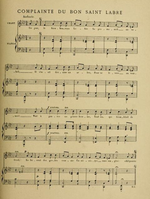 Partition de la chanson d’Émile Mac-Nab : Complainte du bon saint Labre.